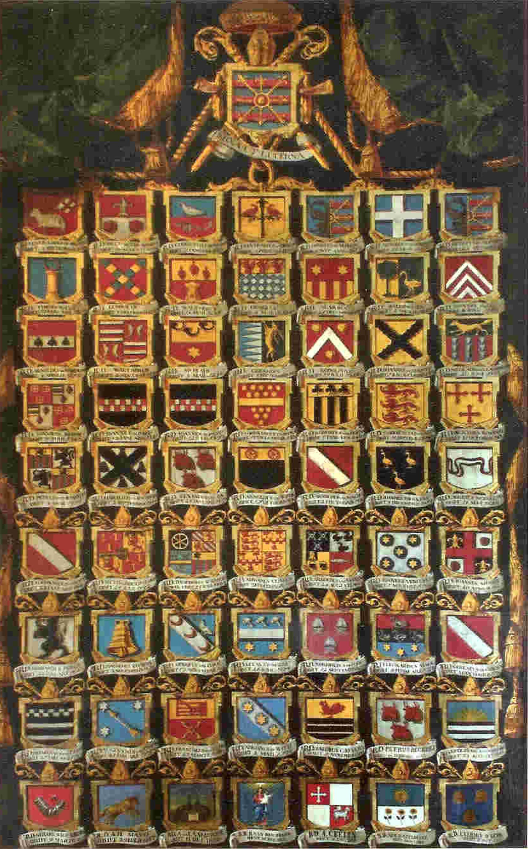 wapens van de abten van Berne